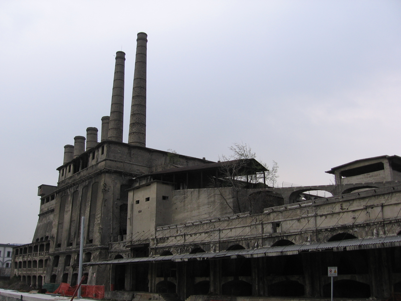 Alzano lombardo, Bergamo, Italia. Ex Italcementi. Sotto le ciminiere ci sono ancora le fornaci. Attualmente utilizzata come deposito da una ditta che ne é proprietaria. Accanto c'é un altro stabilimento analogo, sempre ex italcementi, che attualmente è in ristrutturazione. Vi nasceranno appartamenti (alcuni già abitati) un teatro, negozi, ristoranti e centri congressi. Entrambe le strutture sono protette dai beni culturali.